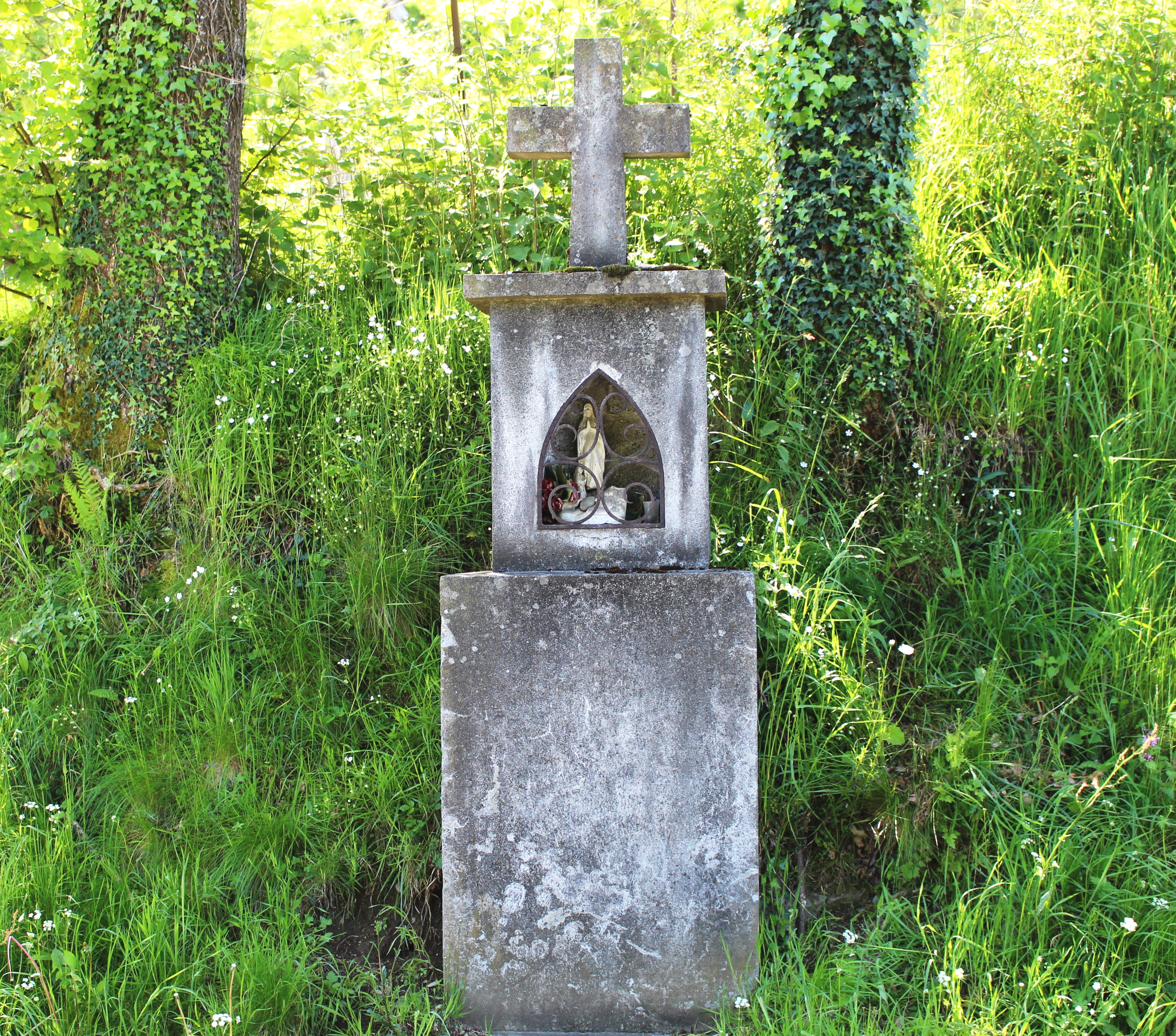 Oratoire de Sireix (Hautes-Pyrénées)